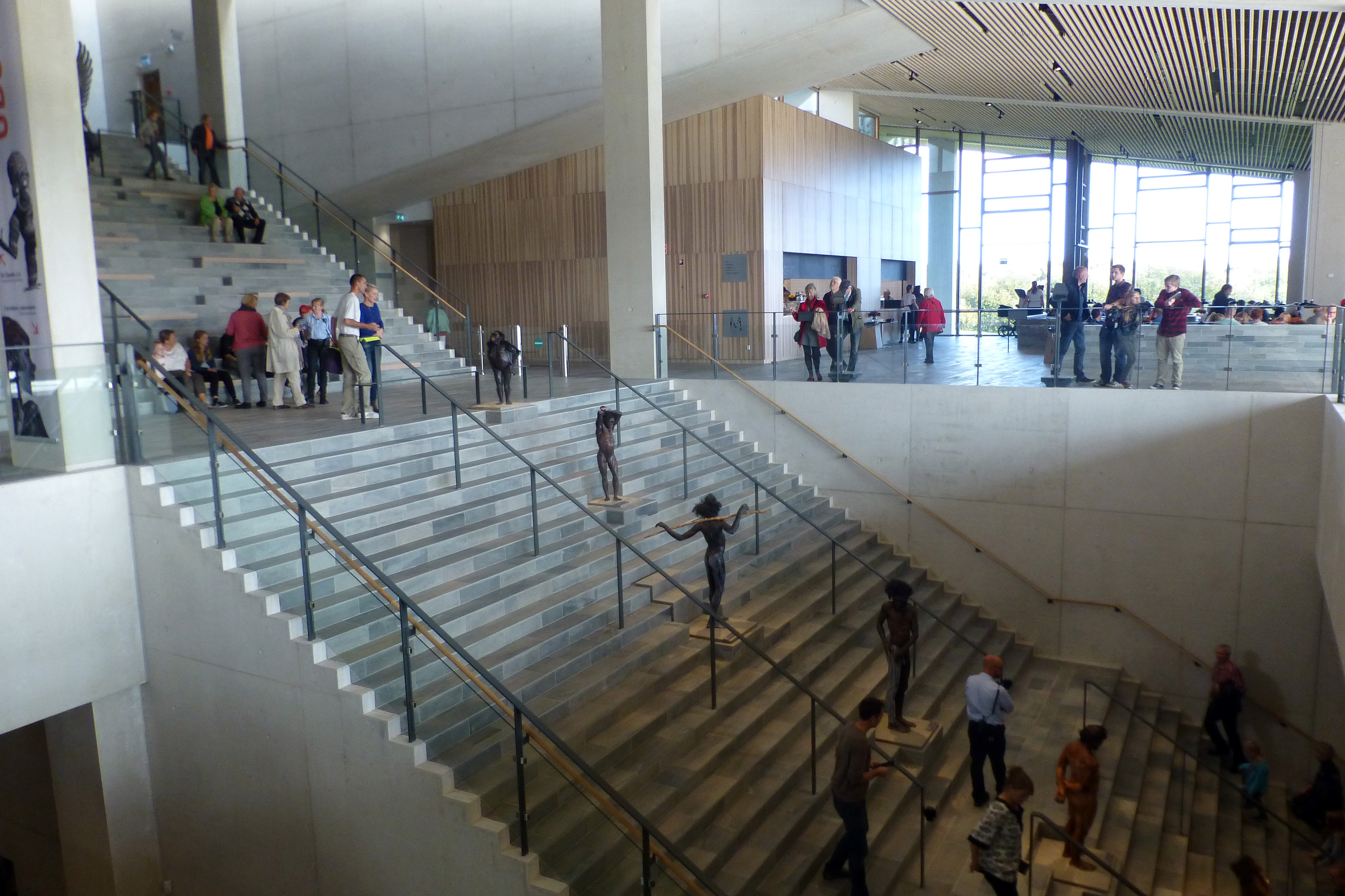 Moesgård hovedtrappen